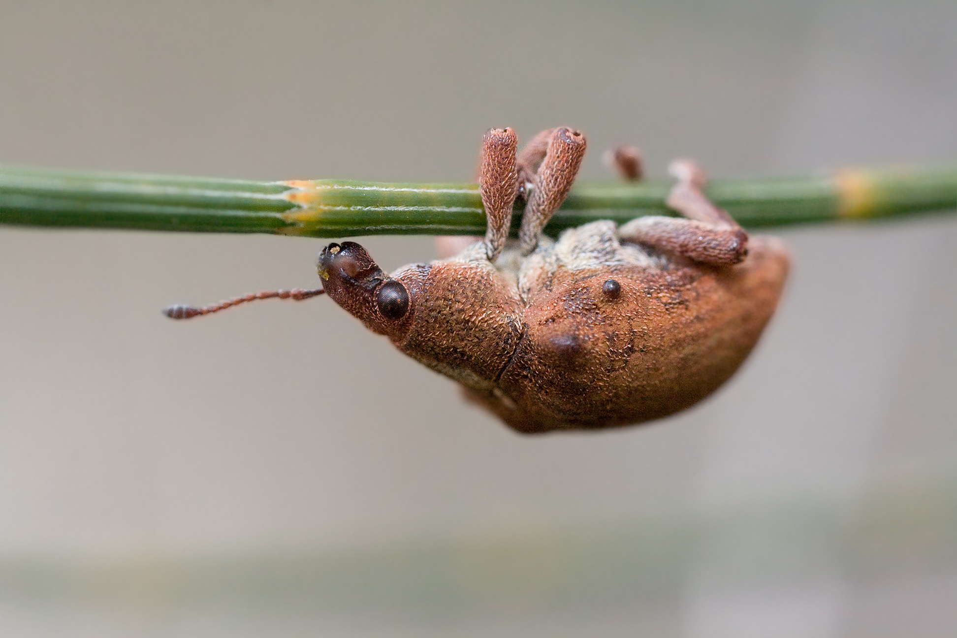 1.2 only